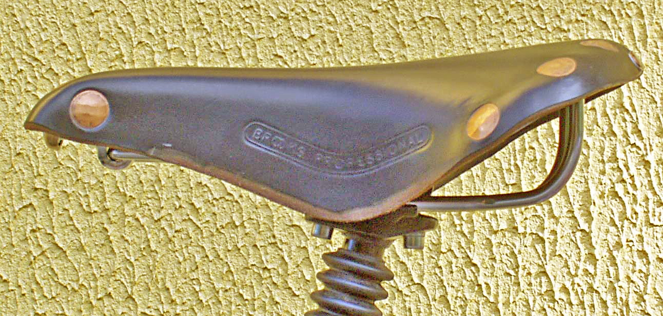 Coursevëlossuedel Brooks